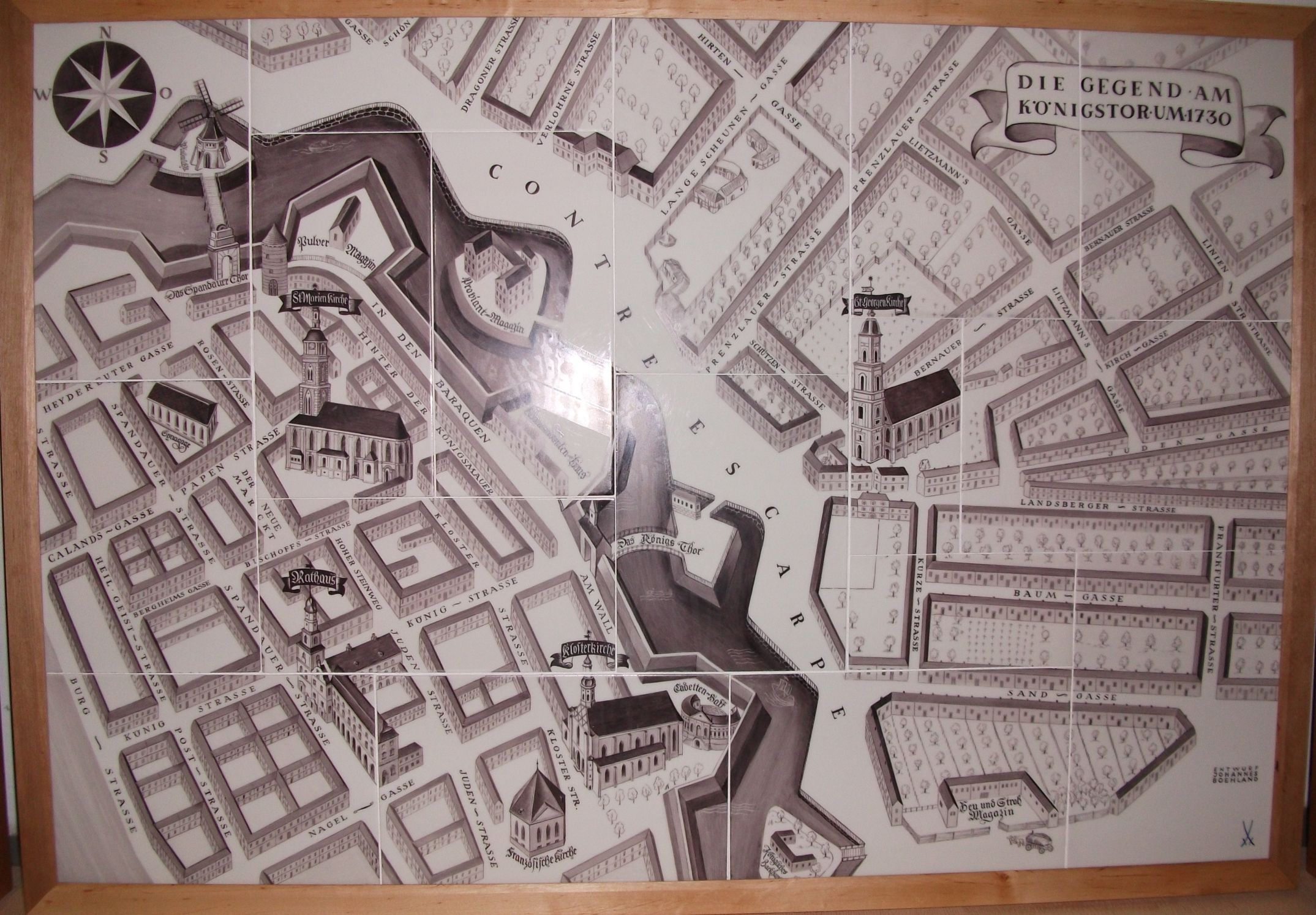 Fliesenbild Alexanderplatz